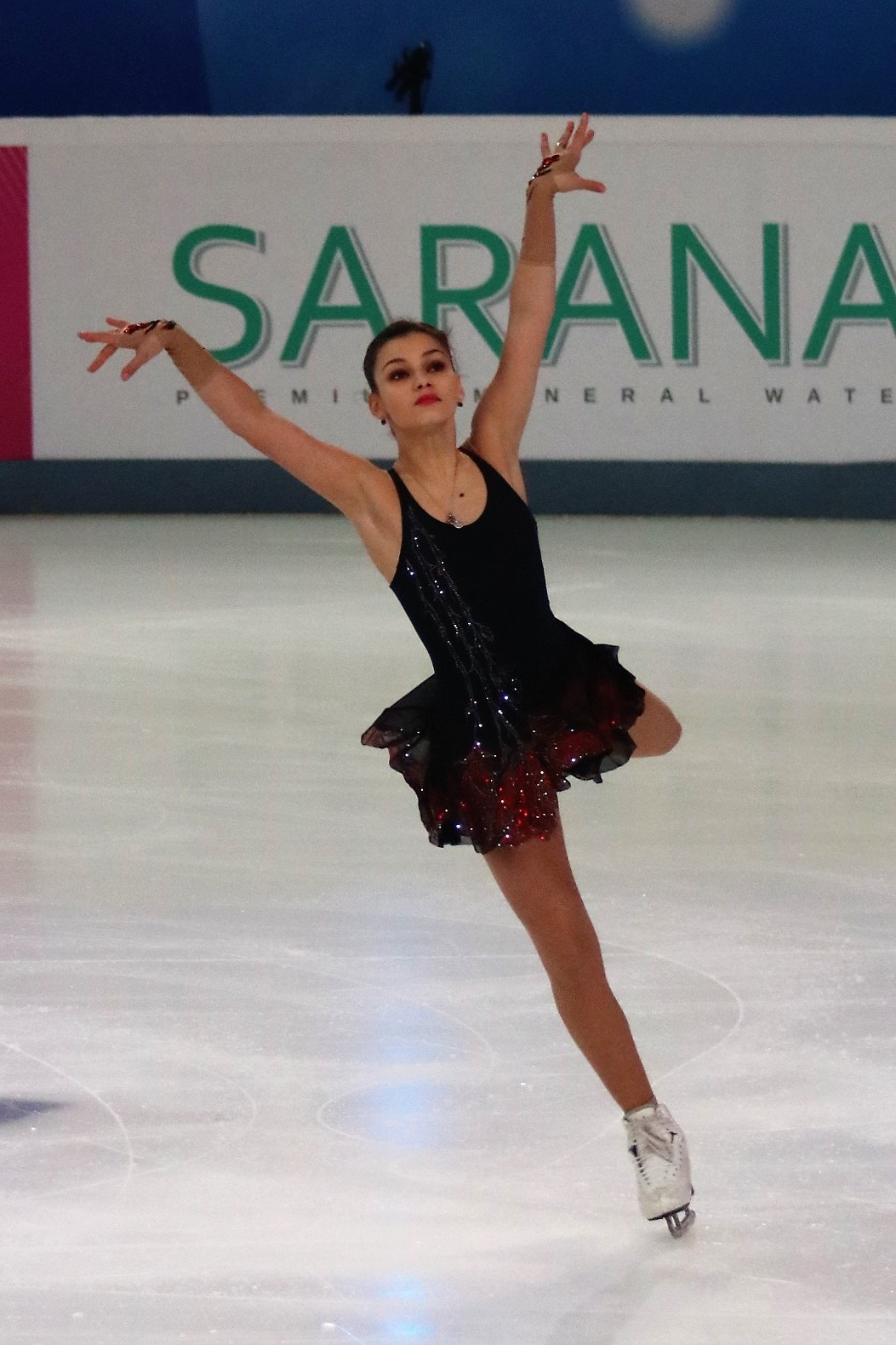 Софья Самодурова на чемпионате России по фигурному катанию на коньках 2019